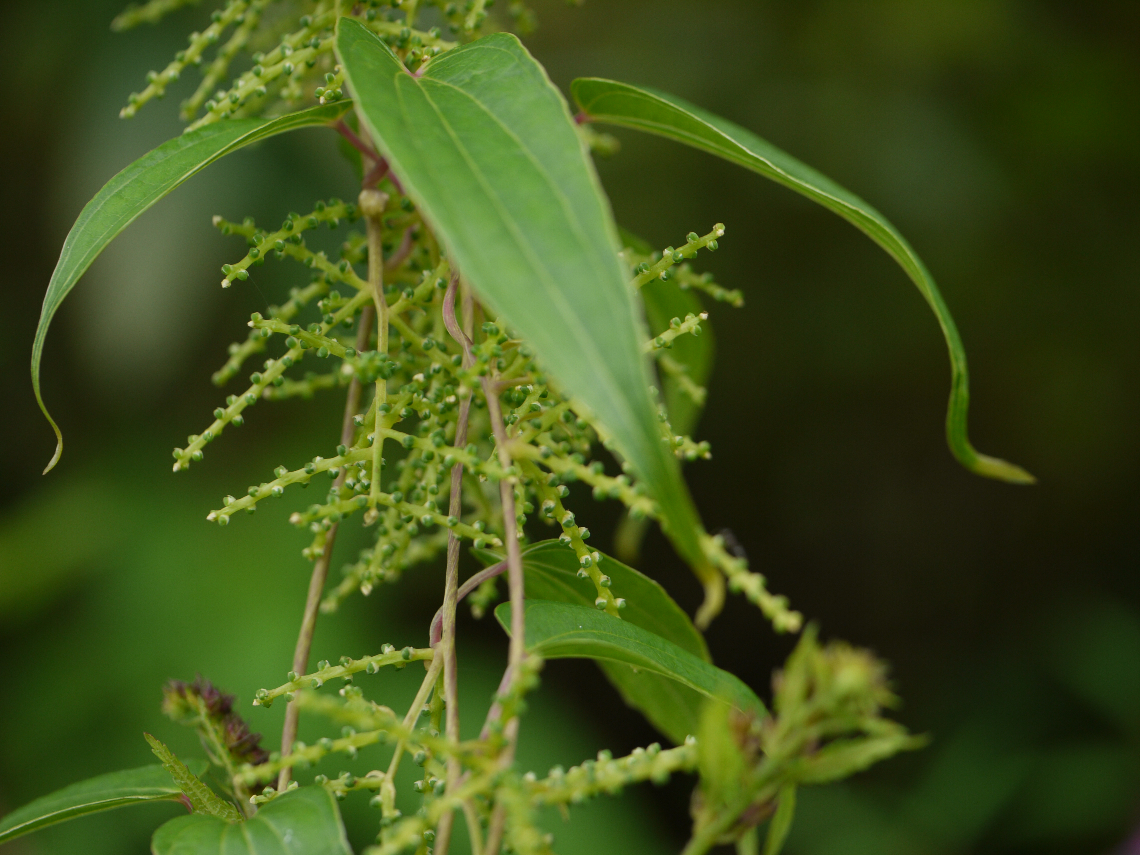 Dioscorea oppositifolia